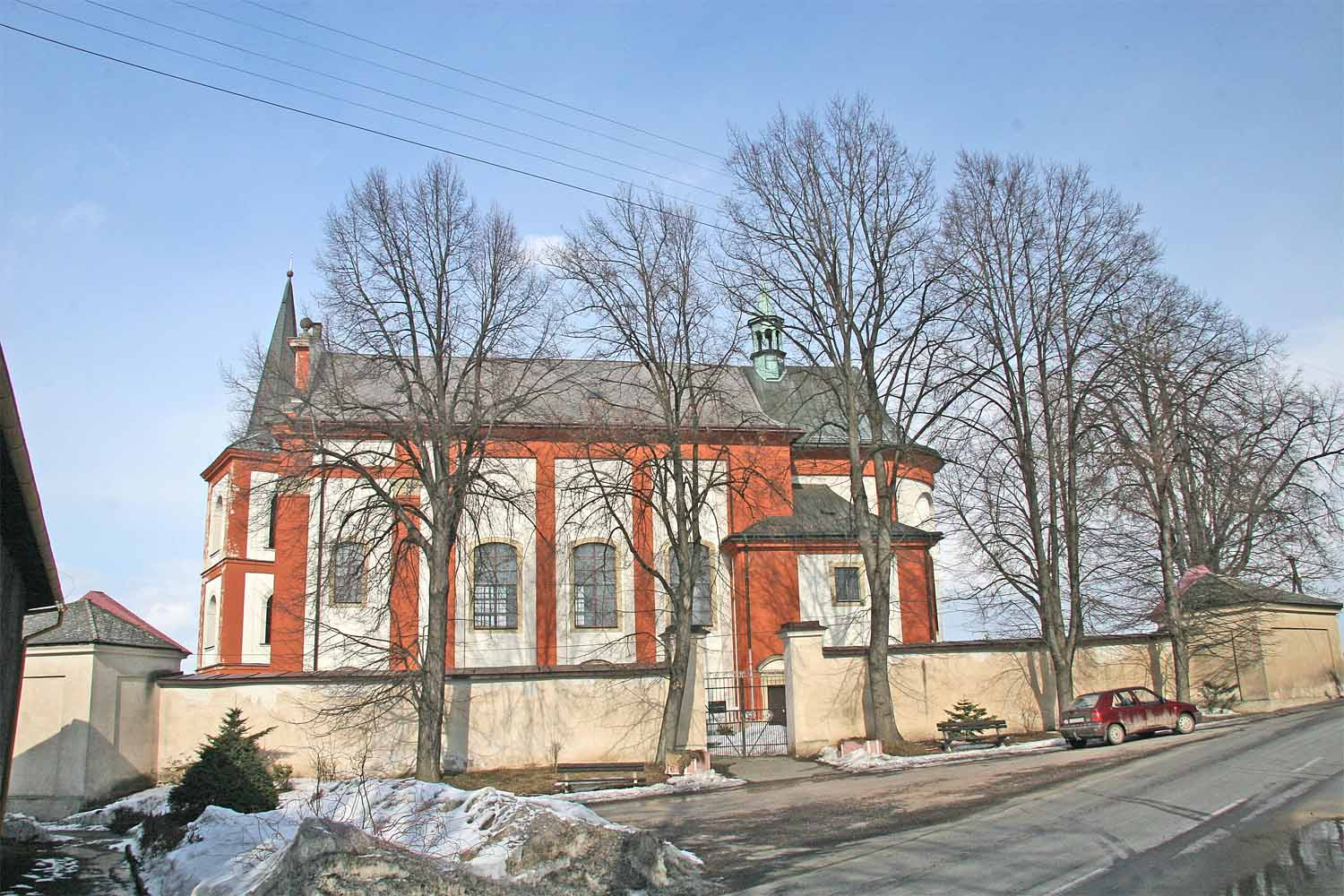 Česky: Poutní kostel Nanebevzetí Panny Marie v Hemži